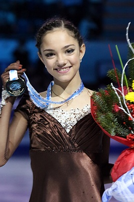 Евгения Медведева на Финале Гран При 2014 - Подиум